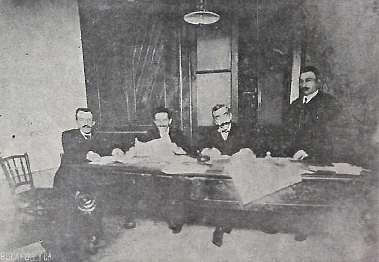 Redacción de Gaceta de Galicia 1904. Aparecen: Dámaso Carrero, José Caramelo, Antonio Fernández Tafall e Constantino Martínez Soto